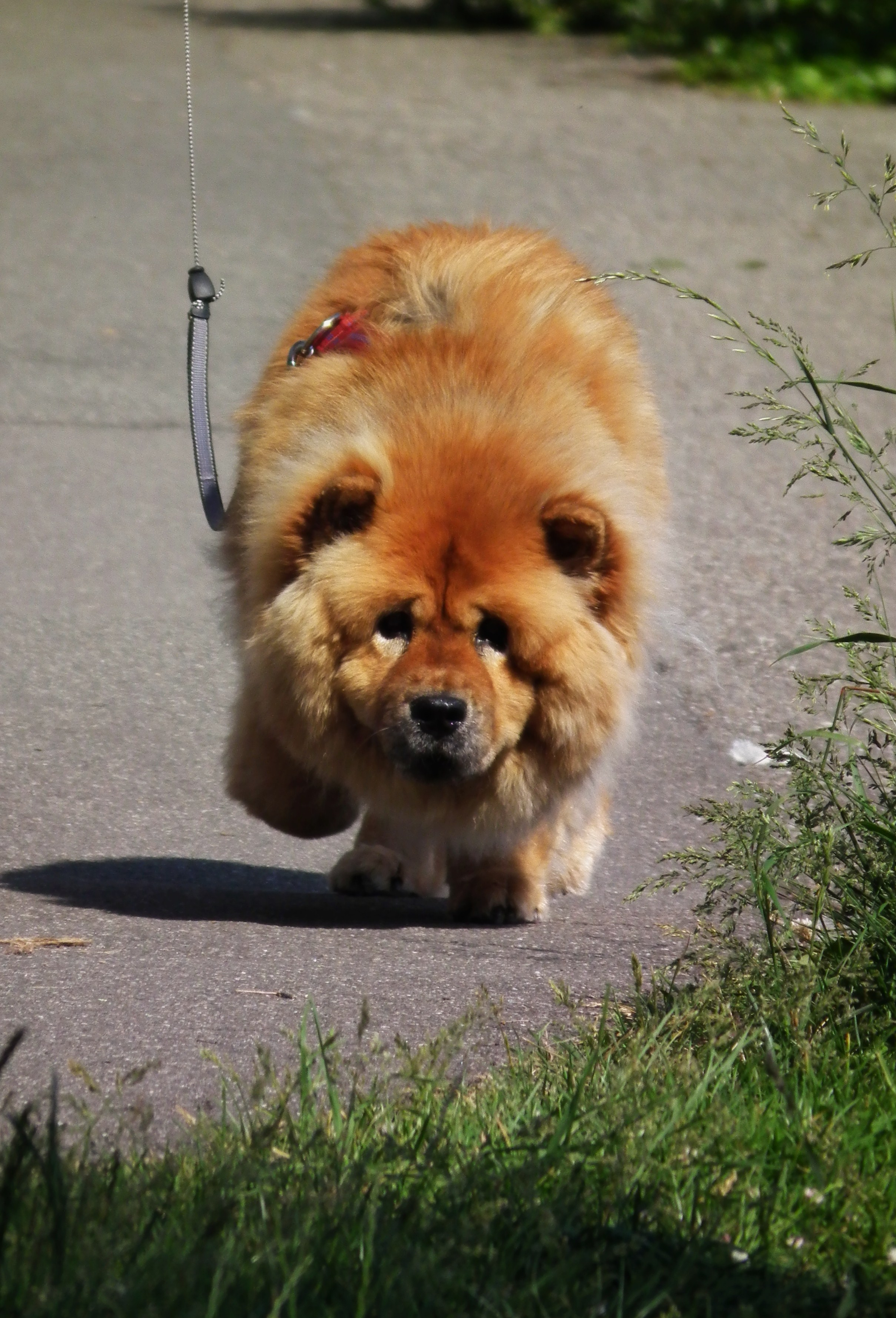 Chow-Chow, fotografiert in Deutschland